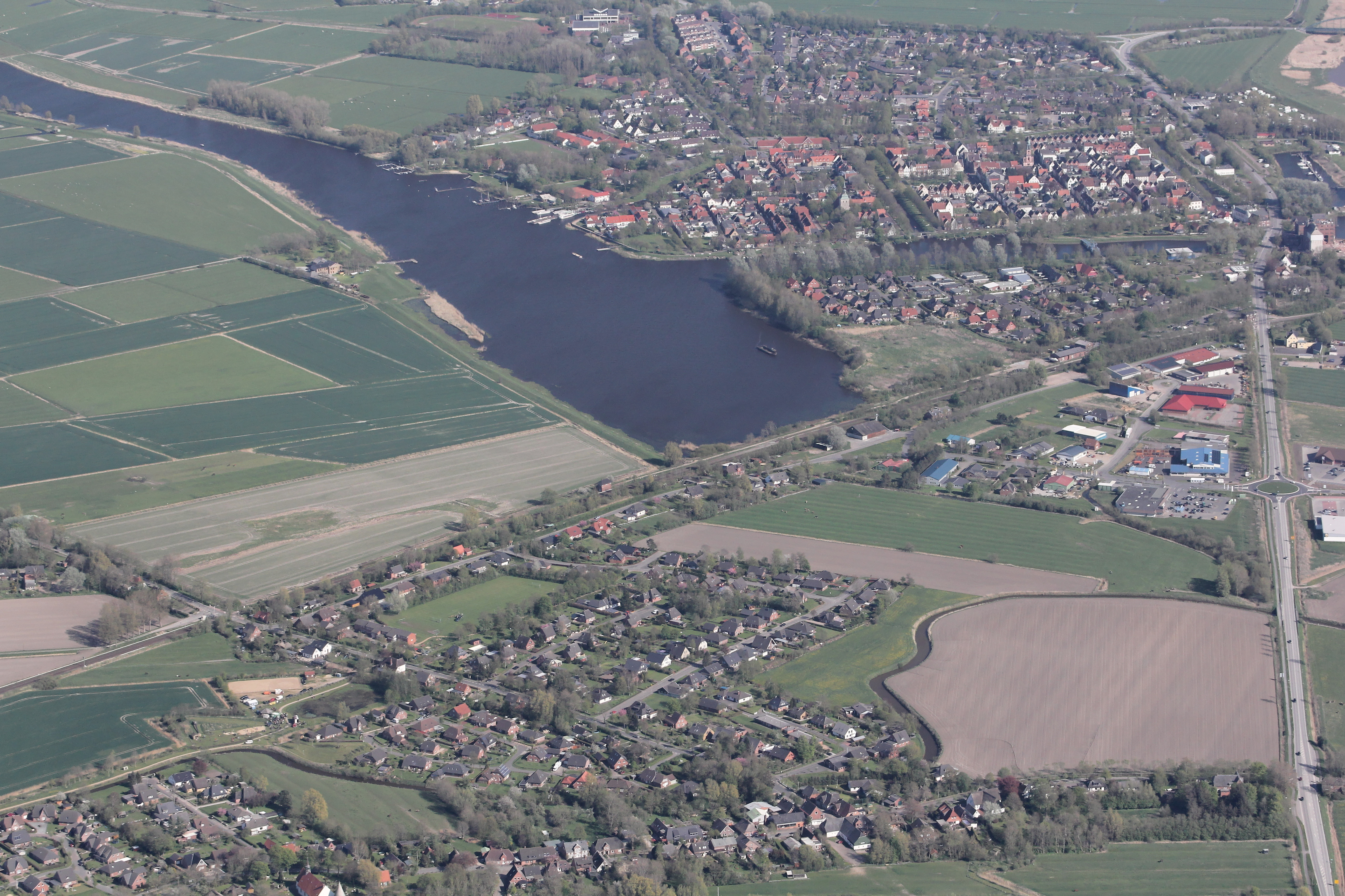 Luftaufnahme: der Fluss Treene und rechts (südlich) Friedrichstadt